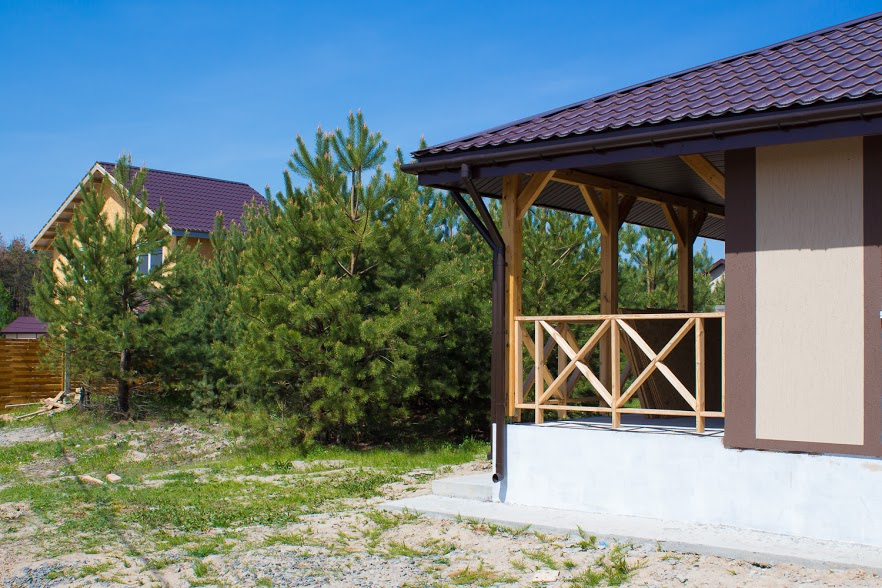 Сосни у "Лісовому озері" розстуть за крок від тераси